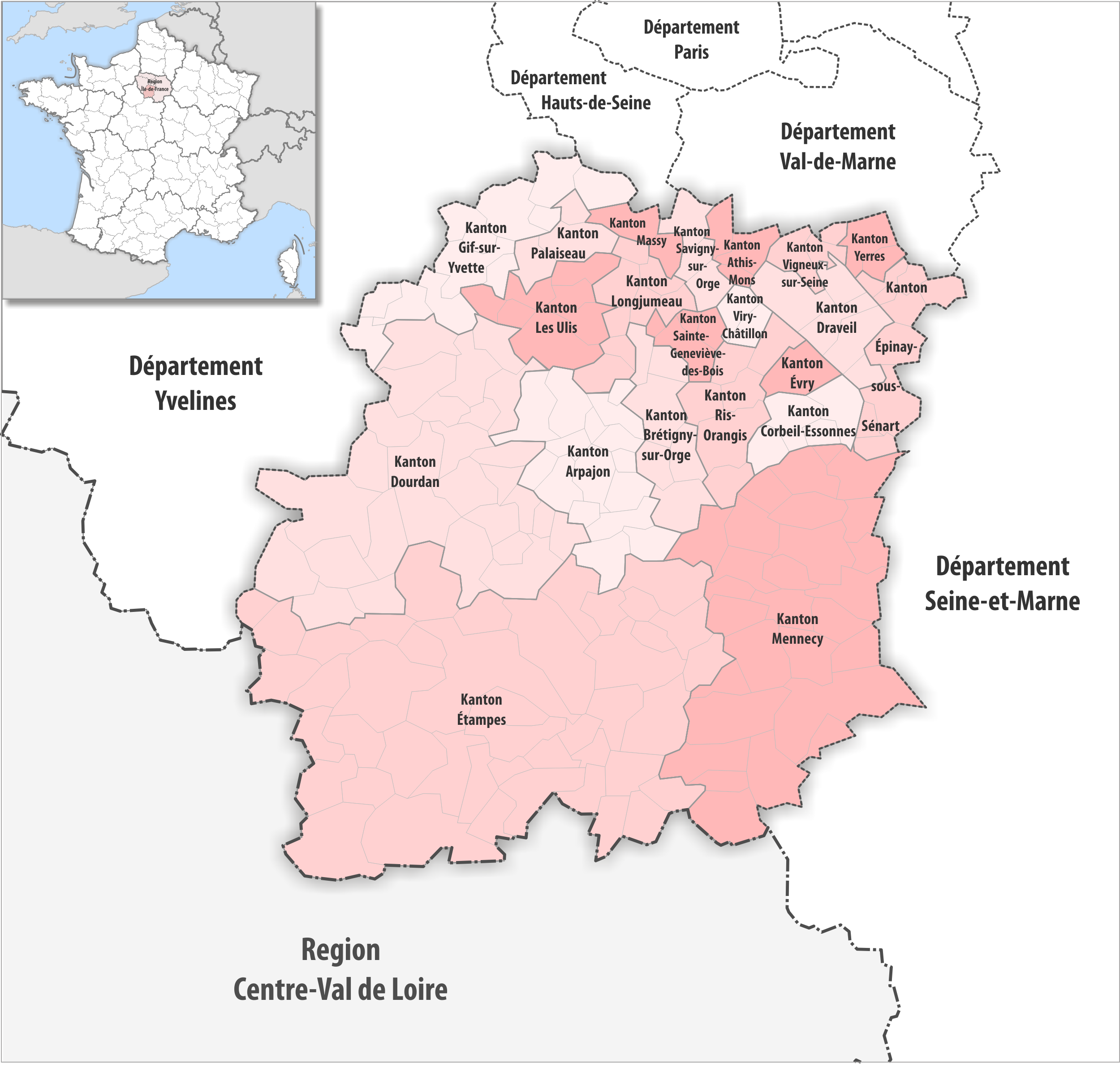 Gemeinden und Kantone im Departement Essonne